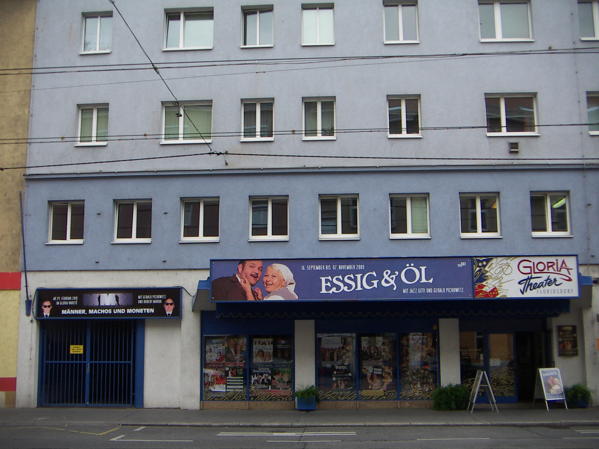 Gloria-Theater (Wien), Eingangsbereich